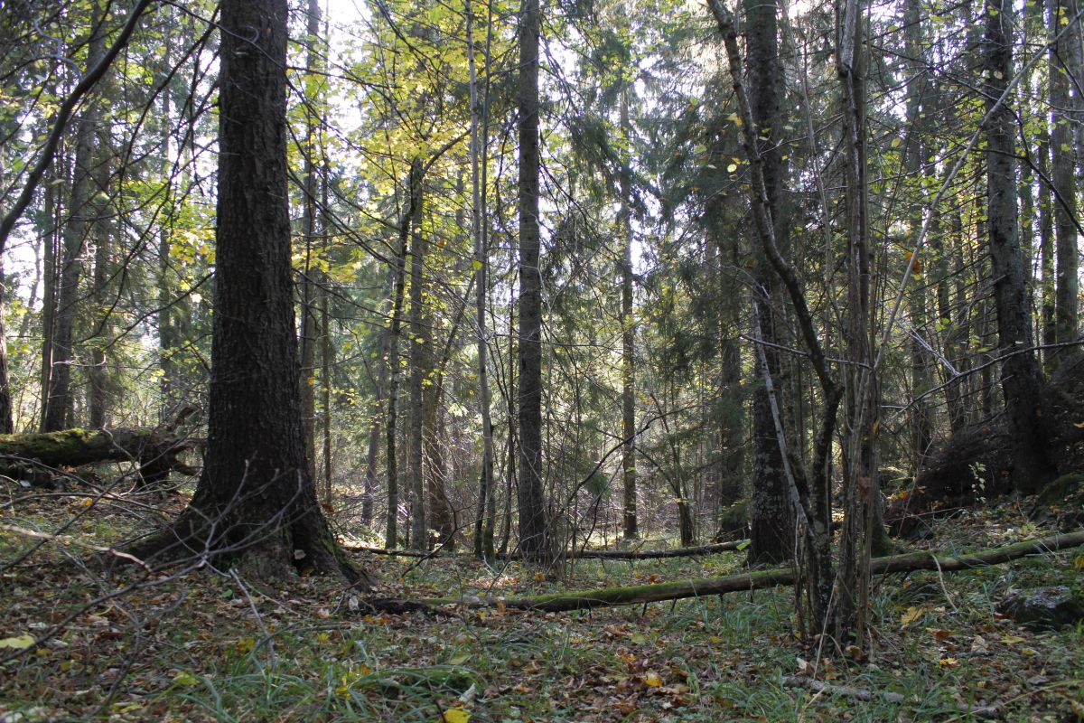 Sæteråsen barskogreservat er lite påvirket av hogst.